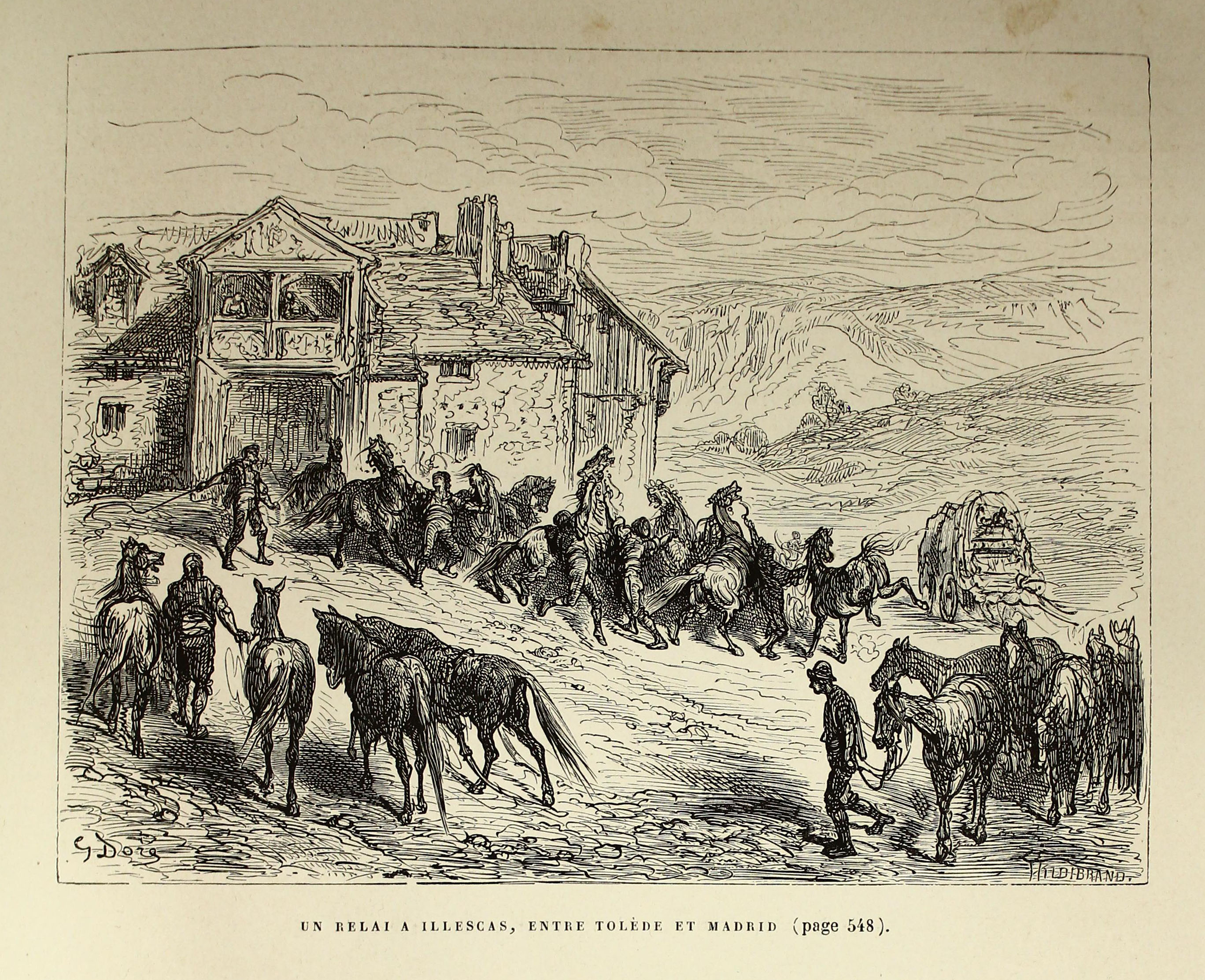 Autor: Davillier, Jean Charles, barón, 1823-1883 Descripción bibliográfica: L'Espagne / par Le Baron CH. Davillier ; ilustrée de 309 gravures dessinées su bois par Gustave Doré. - Paris : Librairie Hachette, 1874. - 799 p. : il. Materia: España- Geografía Materia: España- Usos y costumbres Ilustrador: Doré, Gustave, 1832-1883 Editor: Libreria Hachette Lugar de impresión: Francia, París Localización: Libro completo